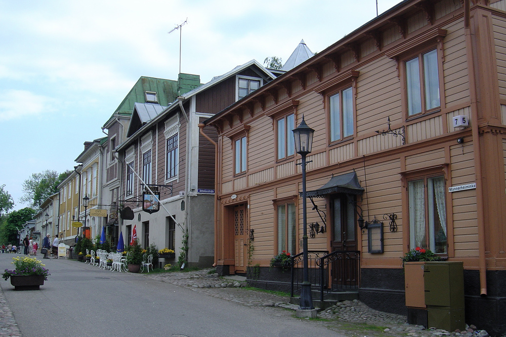 Mannerheiminkatu, Naantali